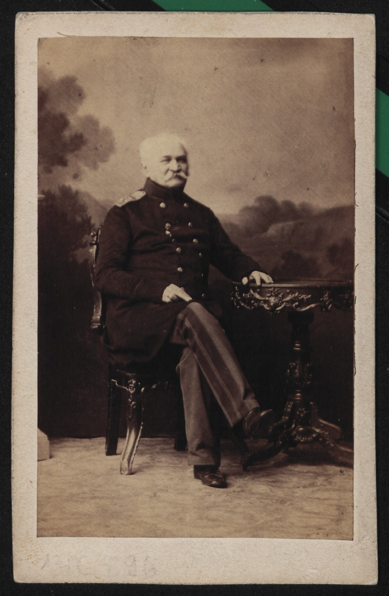 Ignacy Abramowicz, ok. 1860 r.